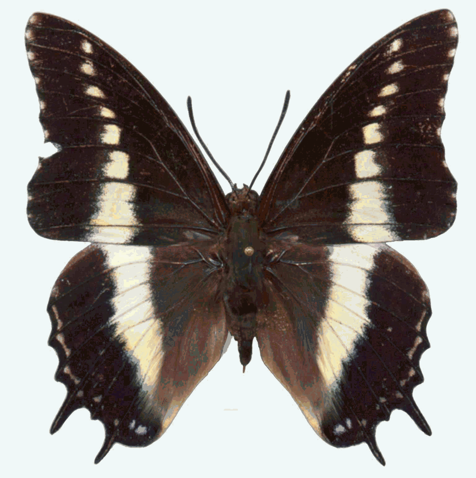 Charaxes antiquus mâle